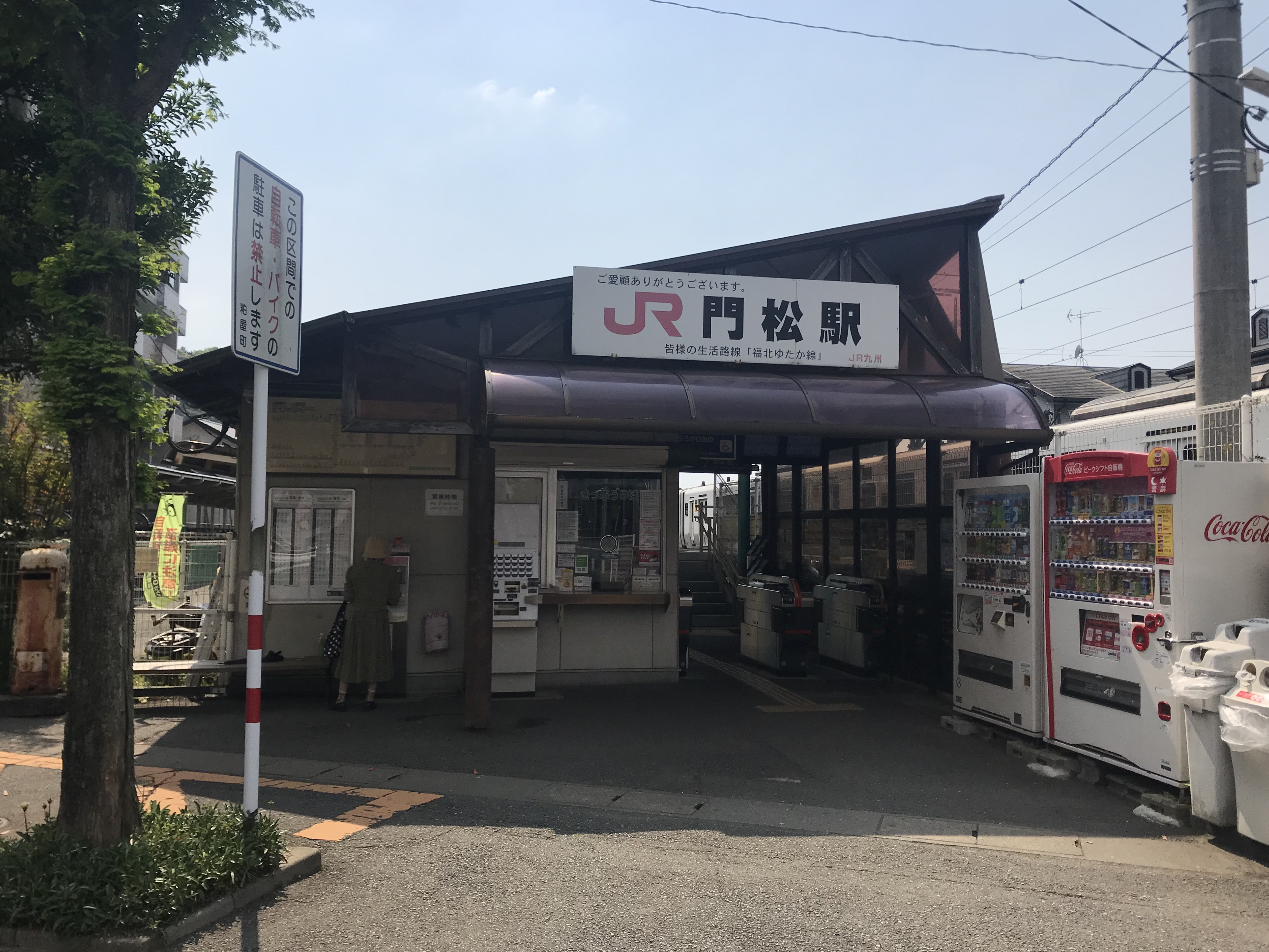 門松駅駅舎